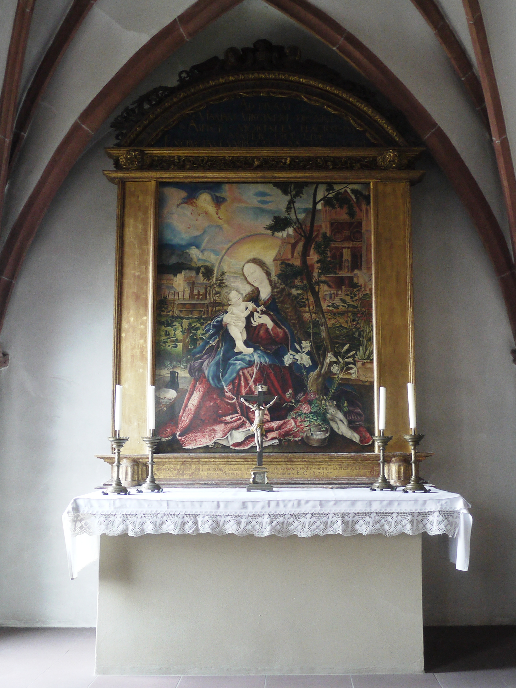 Kopie des Madonnenbildes von Matthias Grünewald durch Christian Schad in der Maria-Schnee-Kapelle in der Stiftskirche St. Peter und Alexander in Aschaffenburg (Original: Stuppacher Madonna)